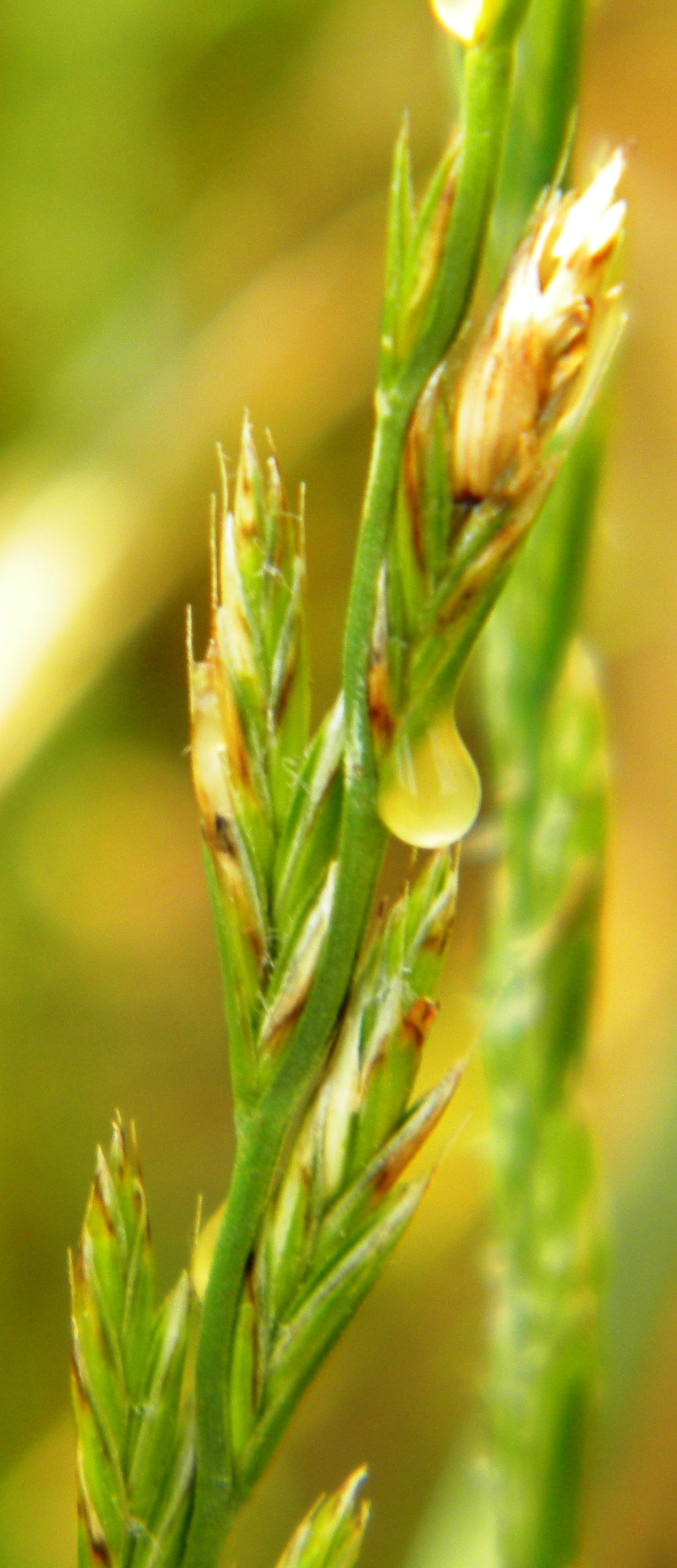 Lolium multiflorum avec mielat du à Claviceps purpurea